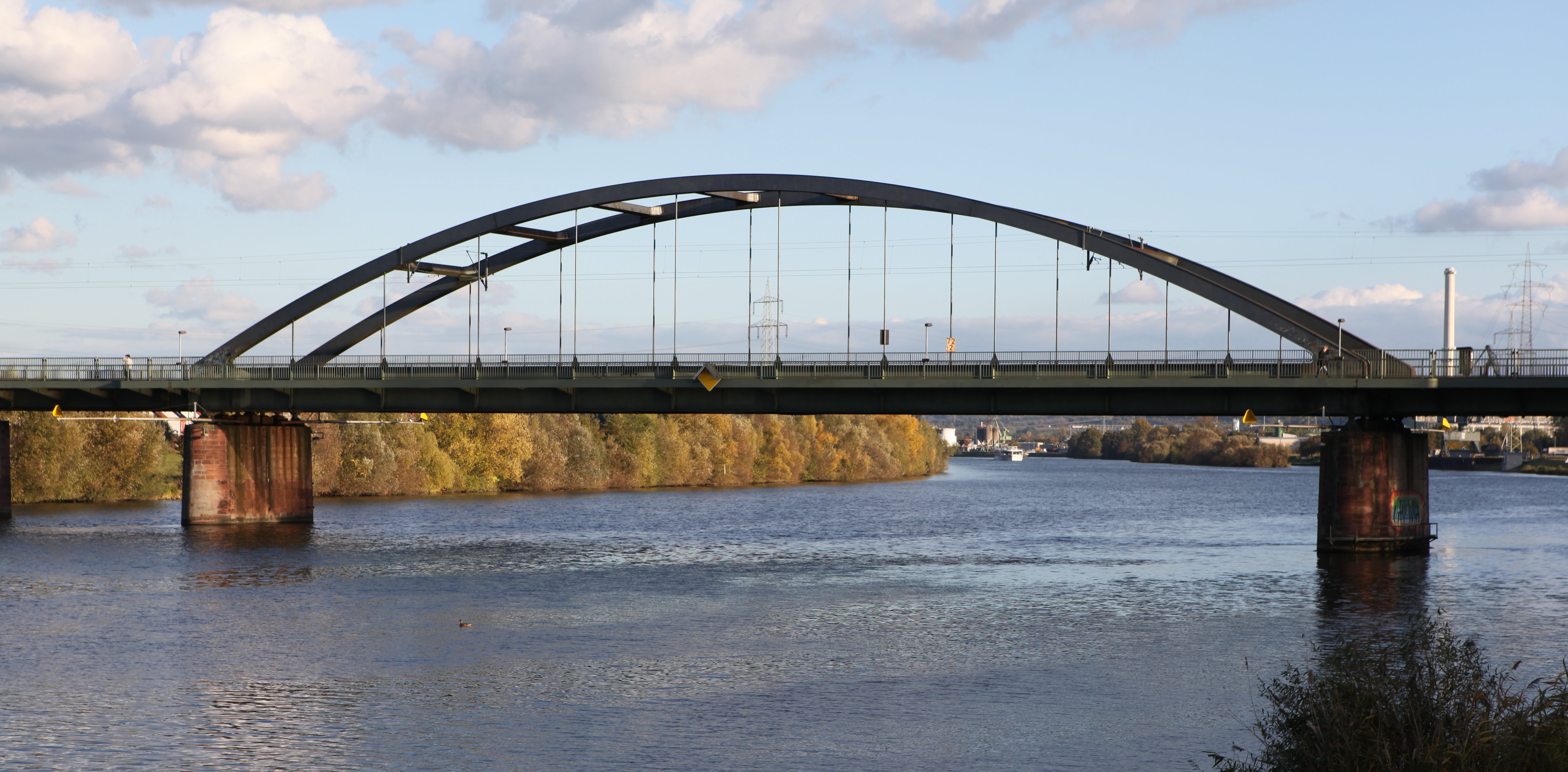 Mainbrücke Stockstadt, Eisenbahnstrecke Darmsstadt-Aschaffenburg, Landkreis Aschaffenburg